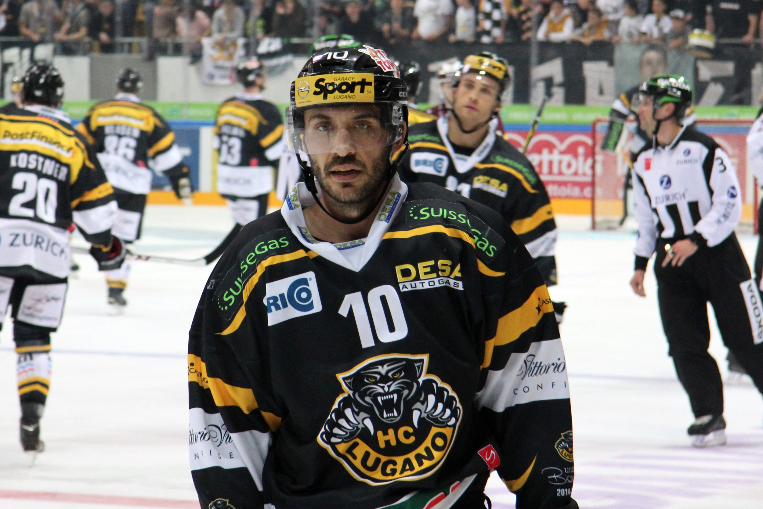 Eric Walsky (L 10).